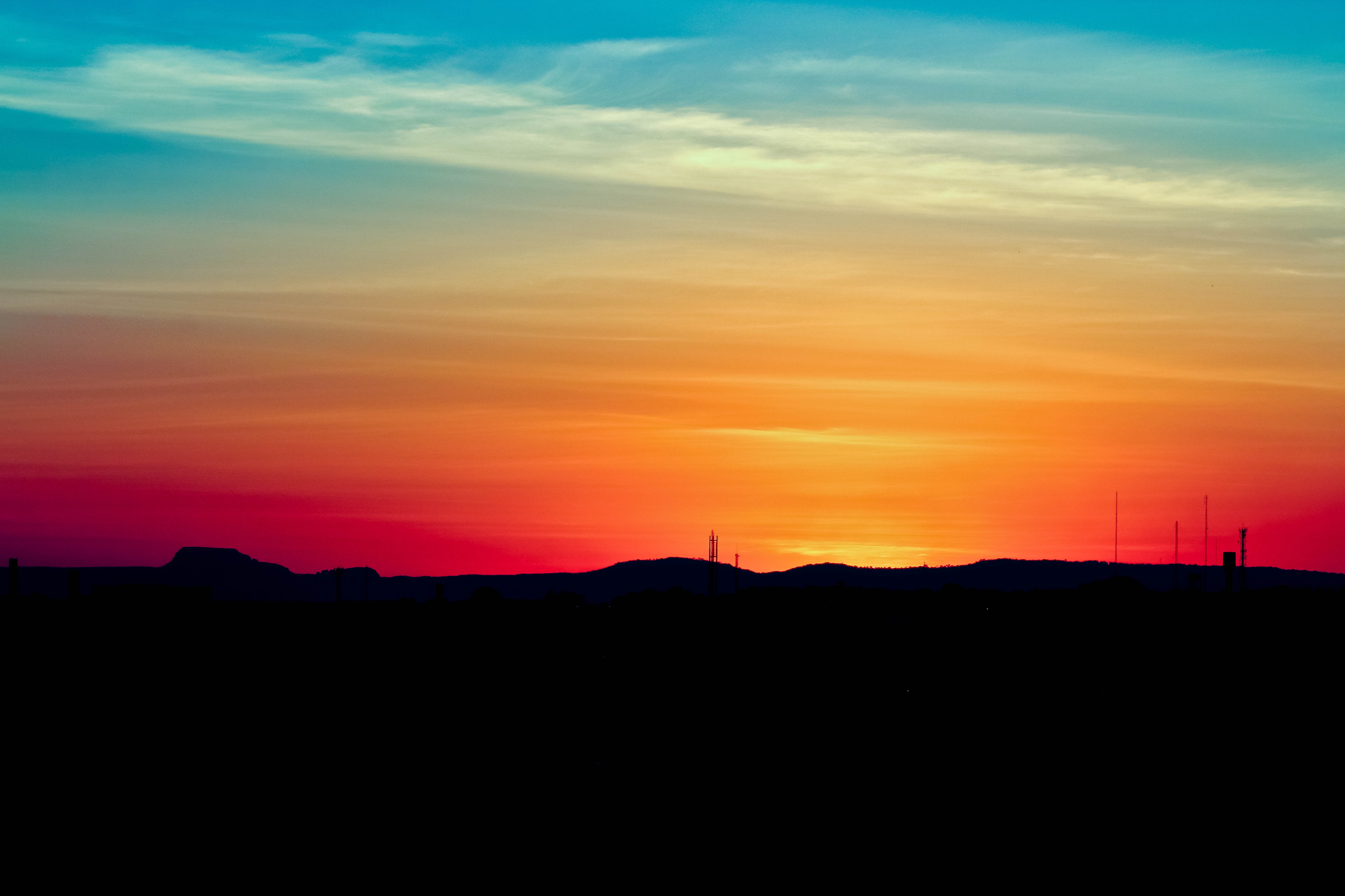 Amanhecer visto do mirante do parque Mãe Bonifácia